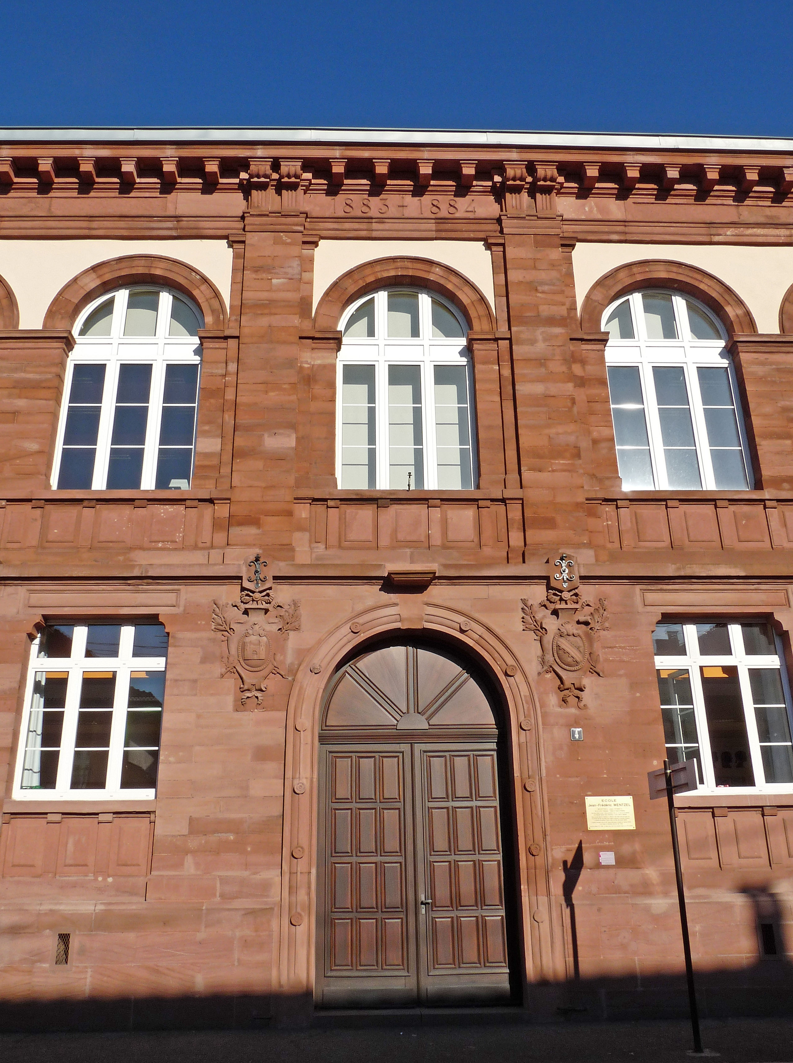 Wissembourg (Bas-Rhin) : Ecole Jean-Frédéric Wentzel. Dessinée par Julius Berninger (1856-1926) et Albert Brion (1843-1910), elle fut achevée en 1884. En 1988 elle reçut le nom de Jean-Frédéric Wentzel, imprimeur et lithographe wissembourgeois)